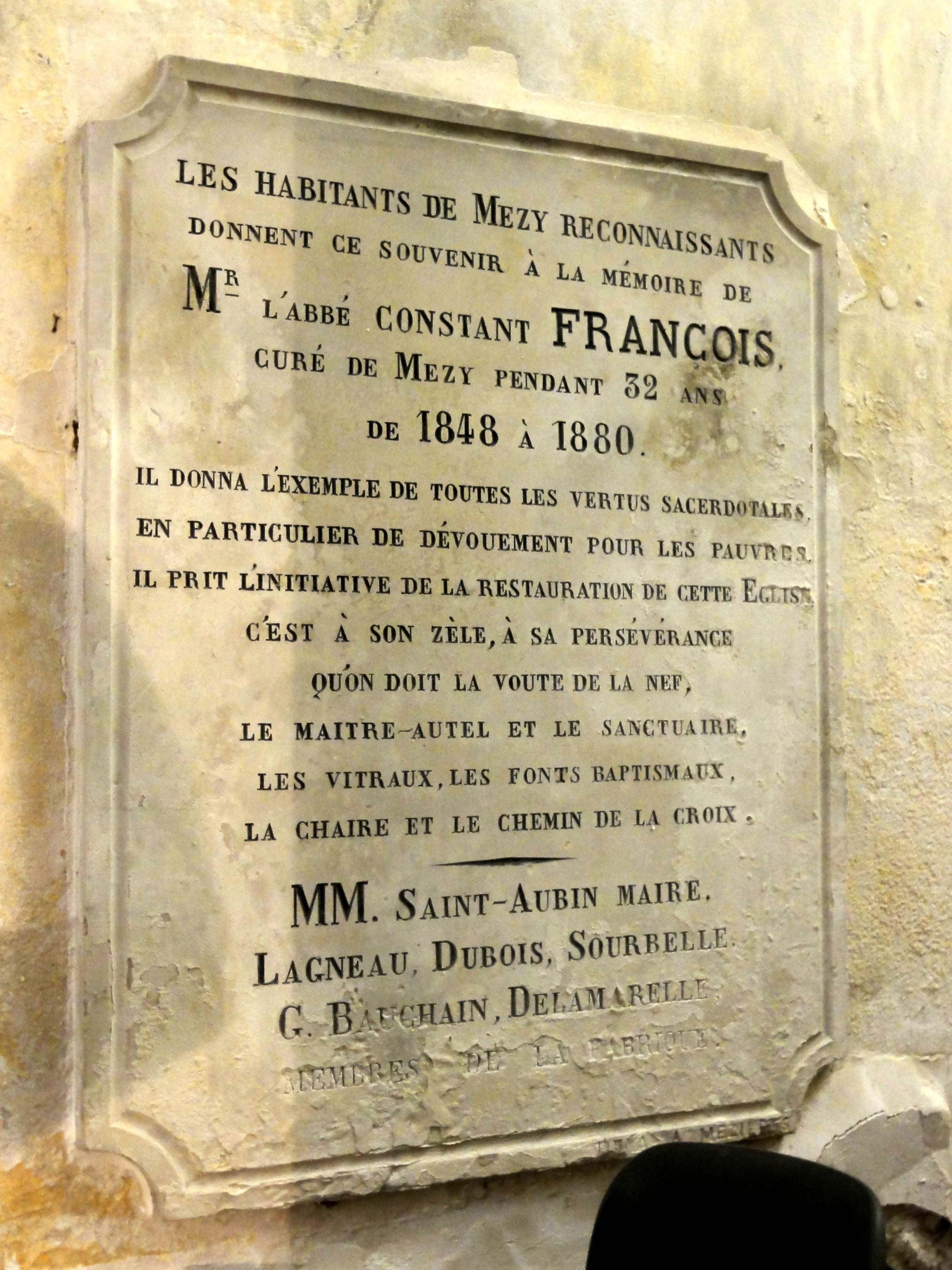 Mobilier de l'église - voir titre.